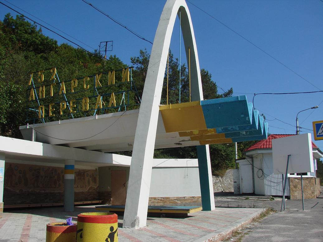 Ангарський_перевал: У серпні 2009